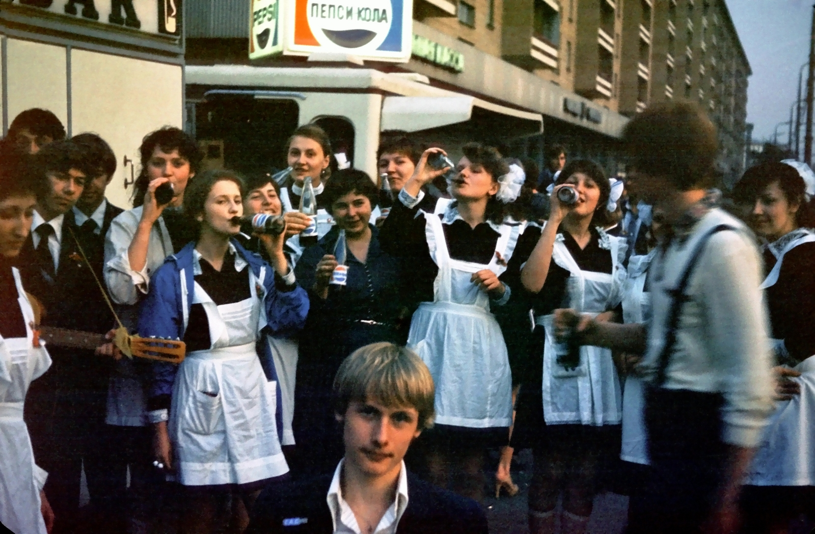 Последний звонок в 10"А" классе, c директором школы № 856, Сушкова Юлия Вмкторовна